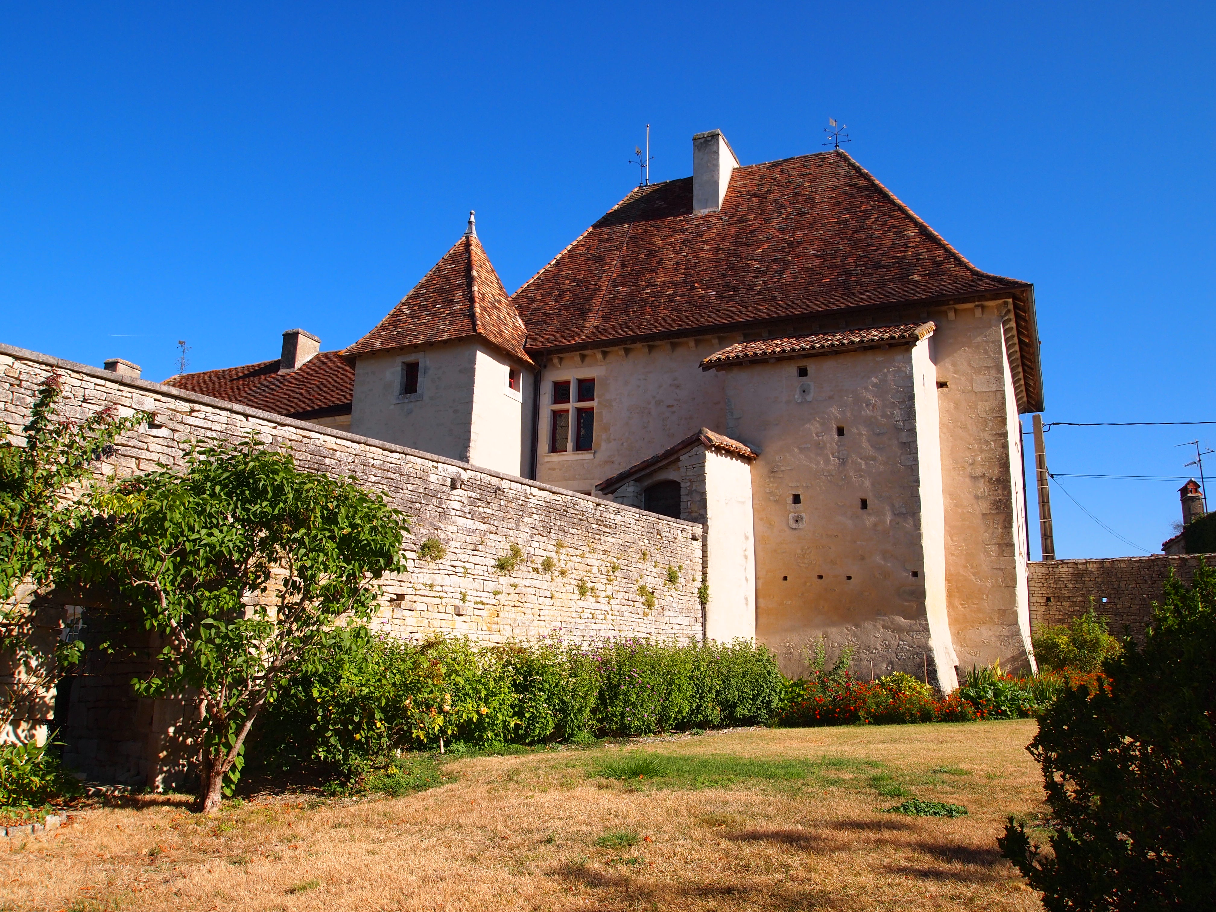 Château de Cellettes, en Charente, en France (inscrit, 2004)